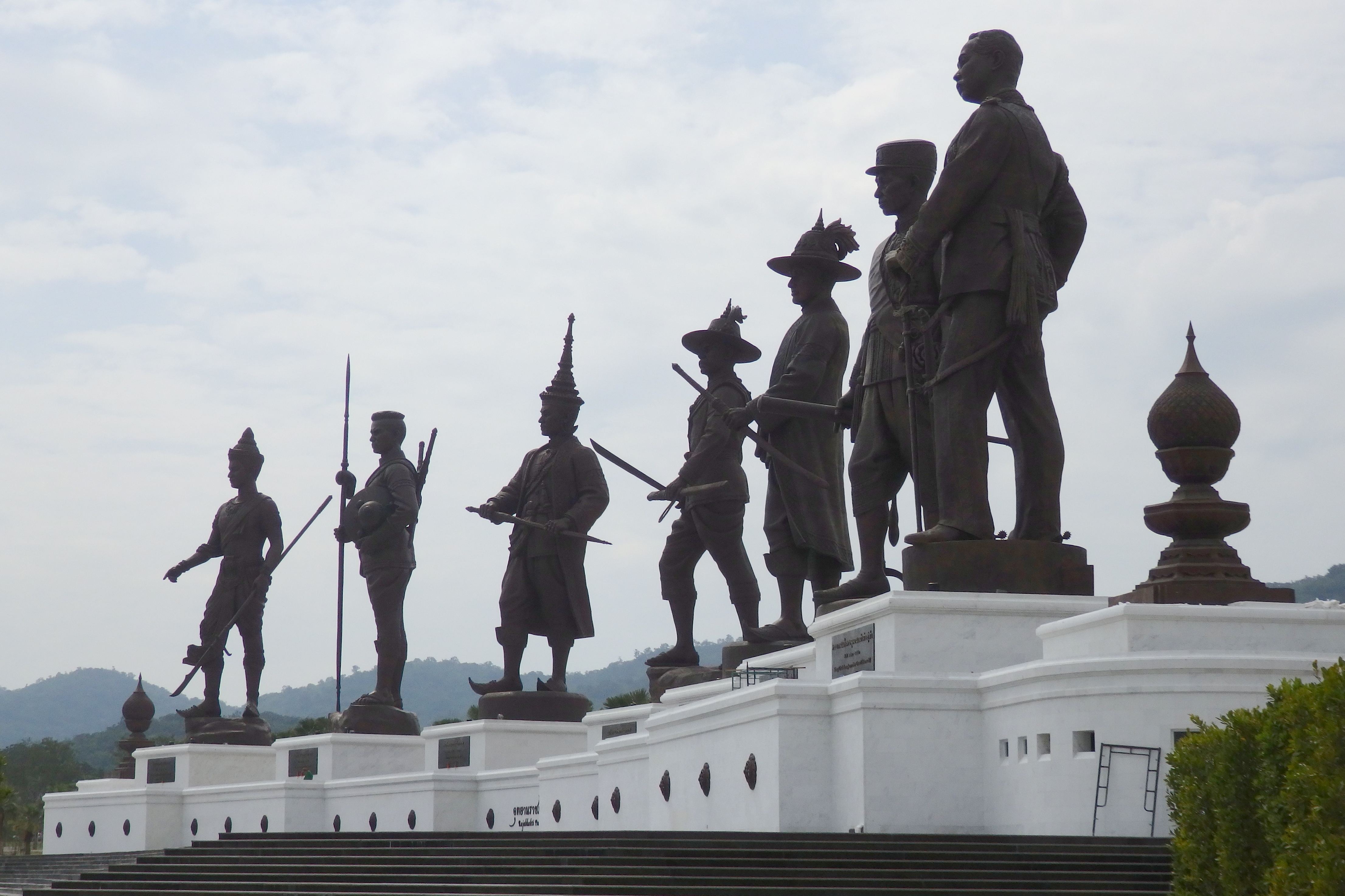 7 Kings